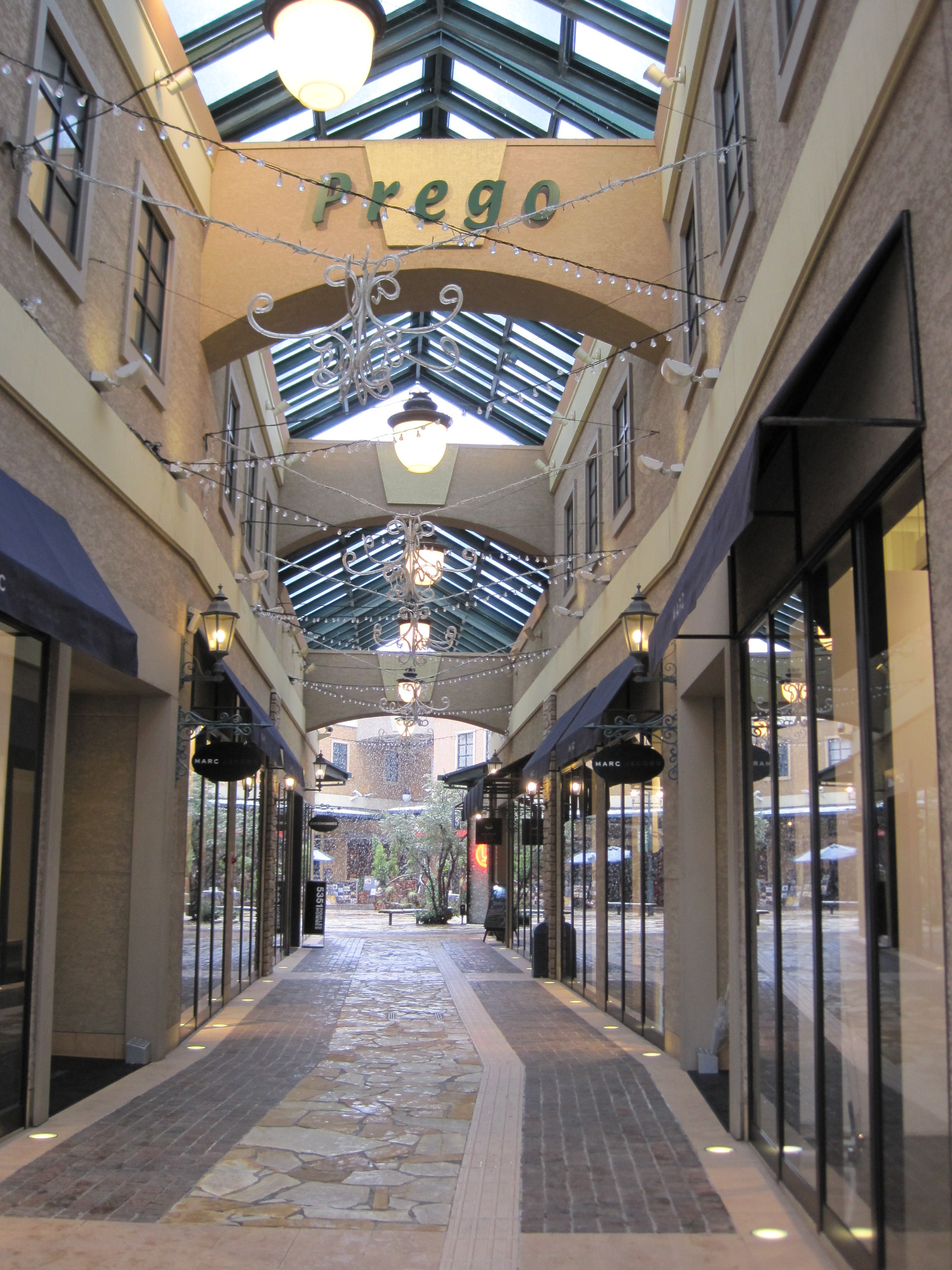 石川県金沢市片町にあるプレーゴ